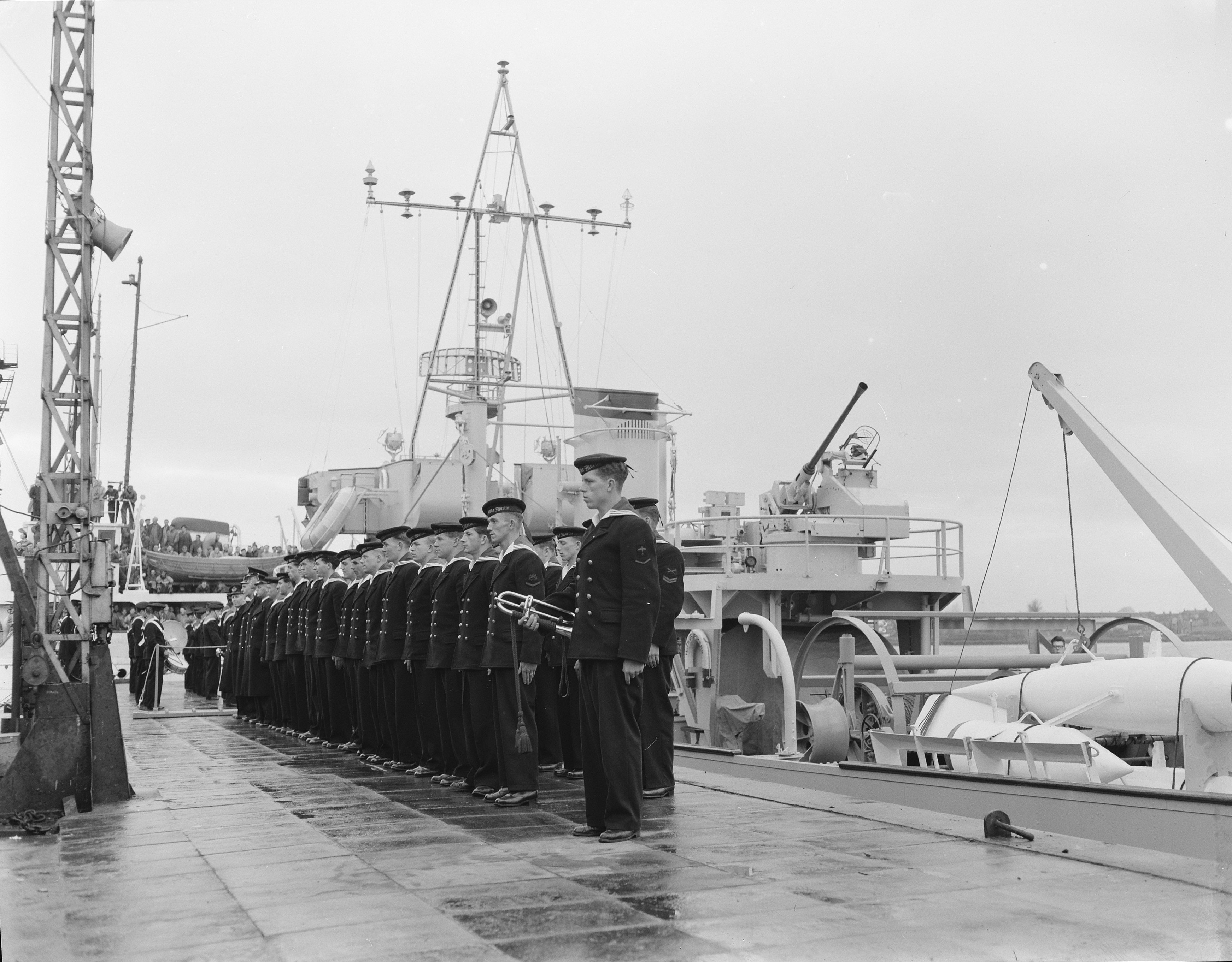 Collectie / Archief : Fotocollectie Anefo Reportage / Serie : [ onbekend ] Beschrijving : Indienstelling Hr. Ms. mijnenveger "Grijpskerk" te Slikkerveer Datum : 16 november 1956 Locatie : Slikkerveer, Zuid-Holland Trefwoorden : marine, militaire vaartuigen, scheepsbouw Fotograaf : Rossem, Wim van / Anefo Auteursrechthebbende : Nationaal Archief Materiaalsoort : Negatief (zwart/wit) Nummer archiefinventaris : bekijk toegang 2.24.01.04 Bestanddeelnummer : 908-1499 Reacties Geplaatst door JOOP LUINING op 22 januari 2014 - 16:28. Hallo ,, Het is al een tijdje geleden maar ik heb op de GRIJPSKERK gevaren ,toen het schip splinternieuw was , Dat was een hele mooie ervaring ,als dienstplichtig marineman . De vraag is zijn er nog meer foto,s van deze mijnen veger ? Ik heb overal gezocht maar het heeft tot nu toe niets opgeleverd . Zelf heb ik nog een paar foto,s maar b.v. niet buitengaats Kunt U mij helpen ? vriendelijke groeten , Joop Luining Geplaatst door Nationaal Archief op 22 januari 2014 - 16:43. Zoekt u eens op